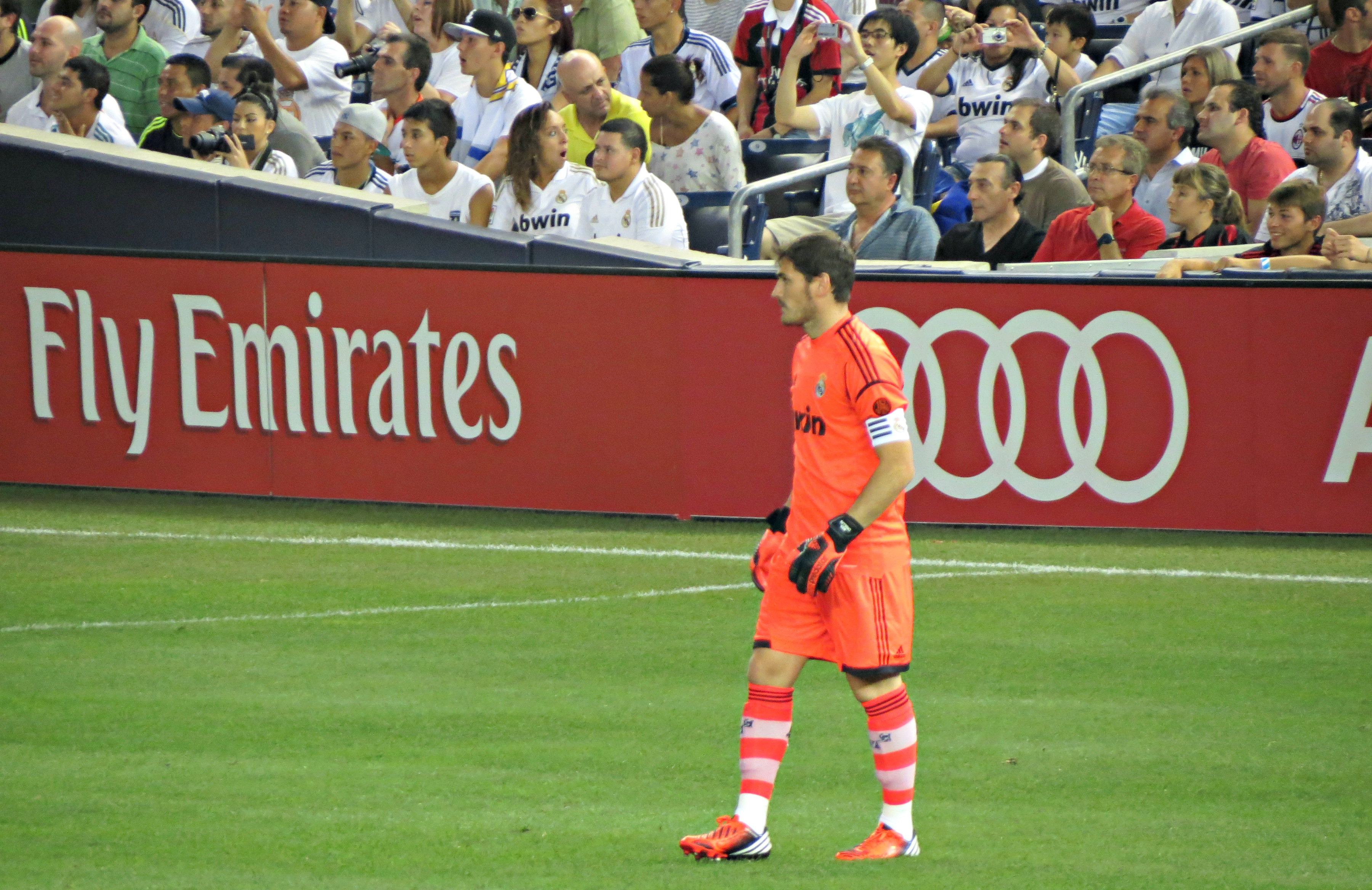 Iker Casillas, goalkeeper for Real Madrid